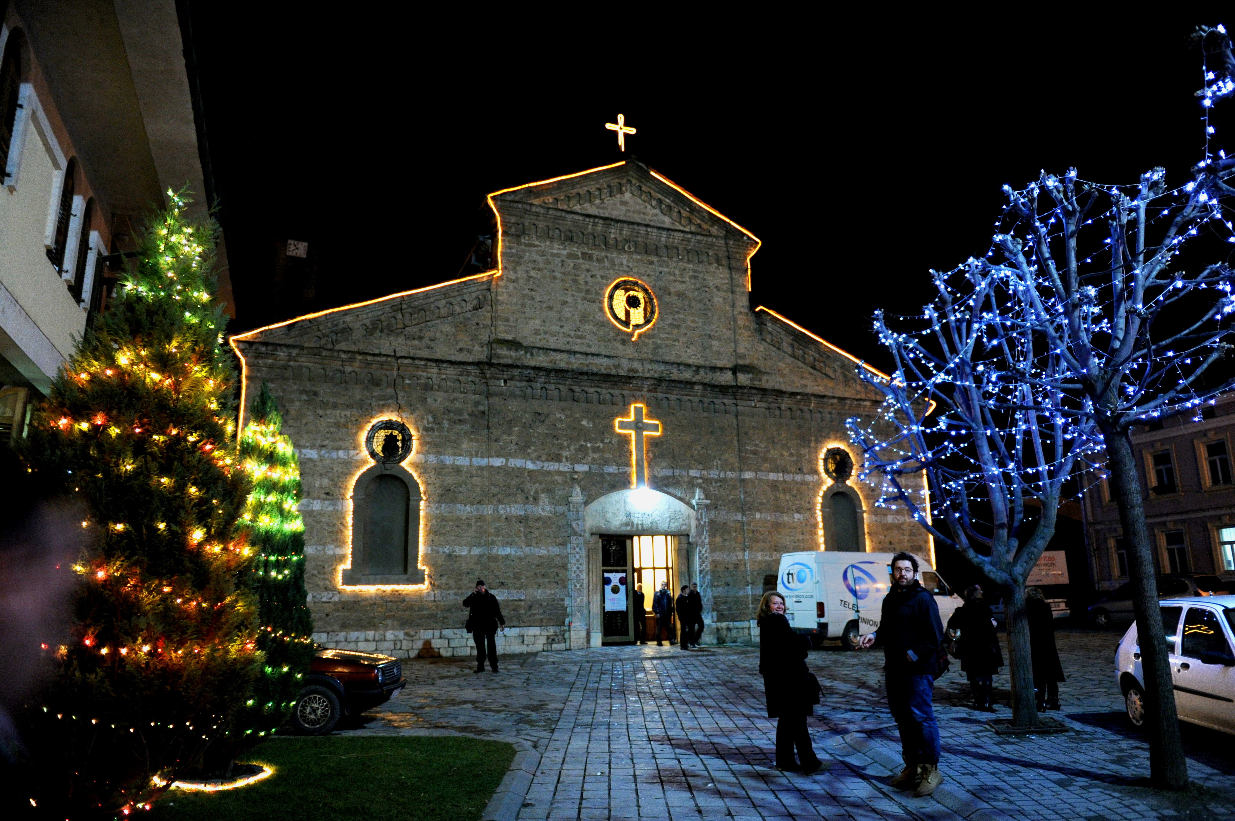 Konkatedrala Zonja Ndihmëtare